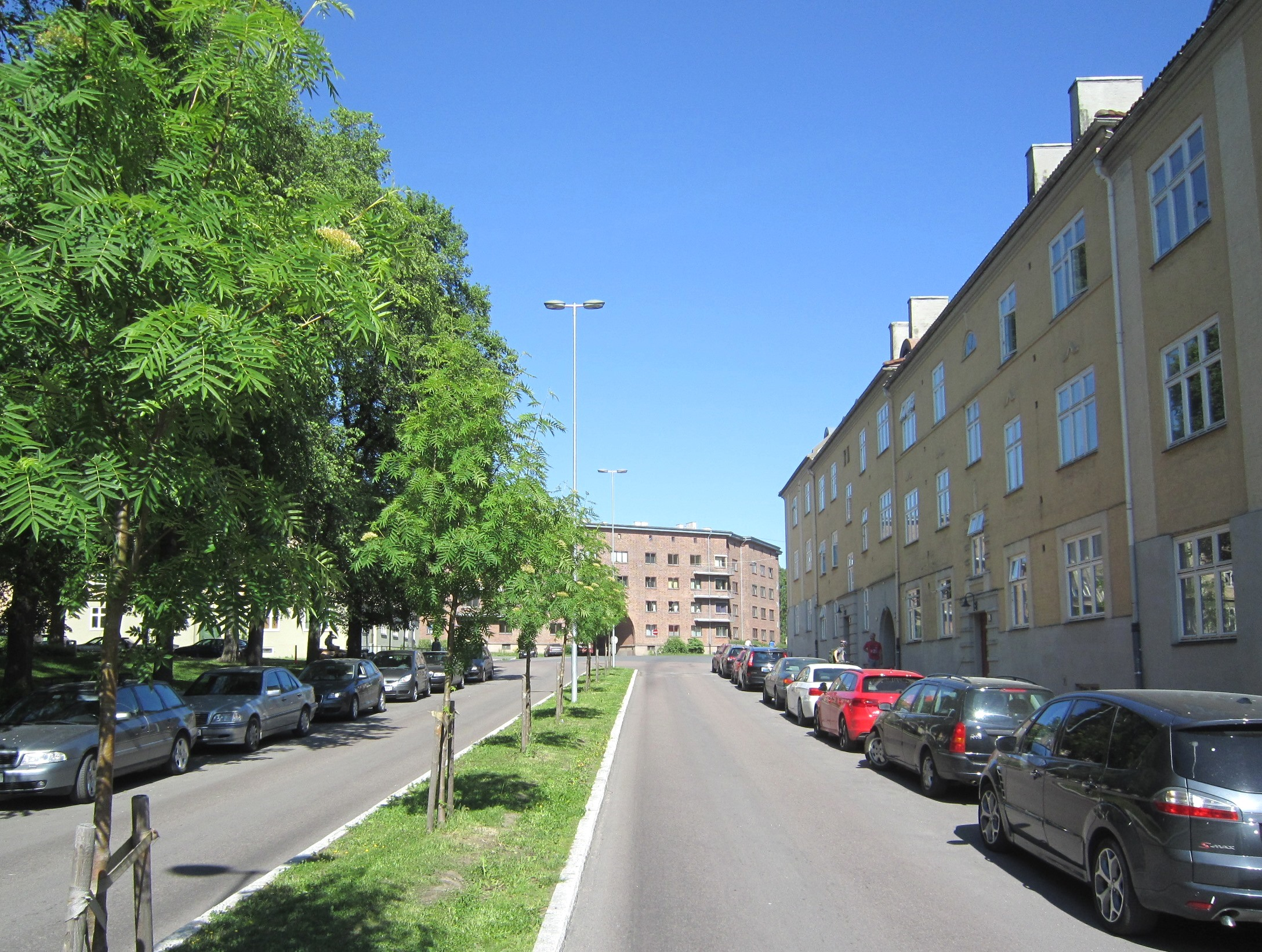 Johan Svendsens gate på Torshov